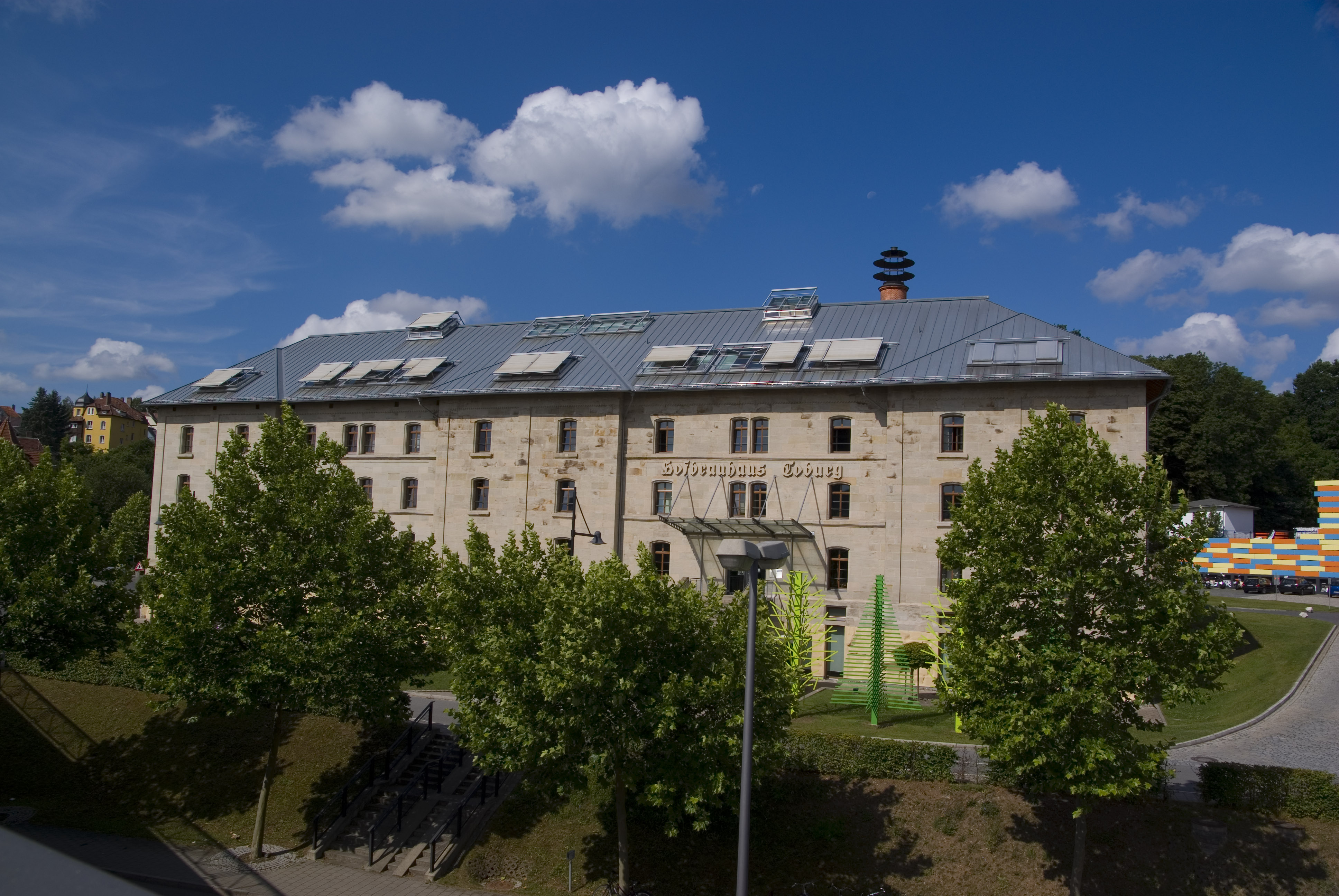 Hofbräuhaus in Coburg, Bayern.